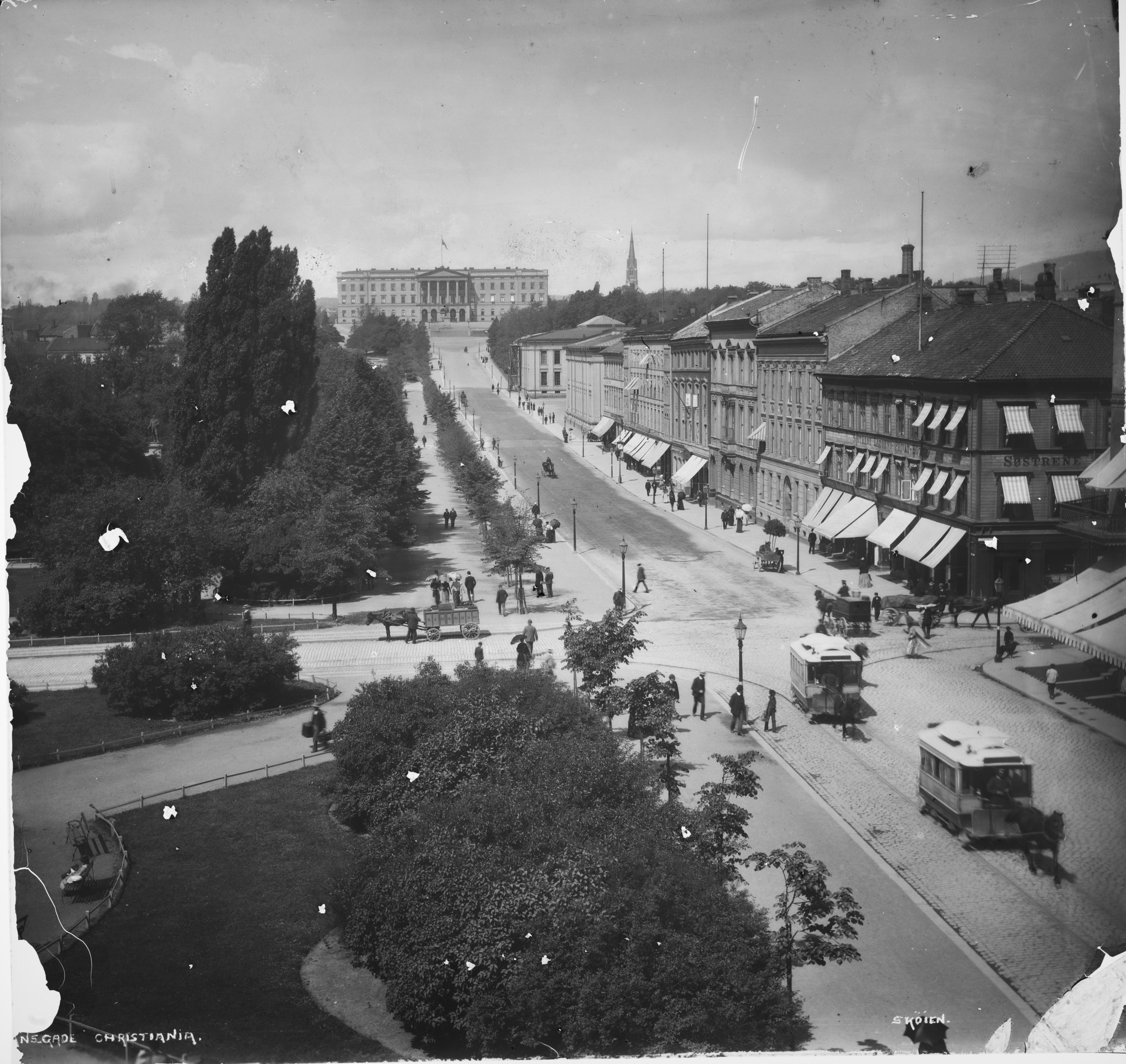 Påskrift negativ: [Tekst borte]nsgade Christiania. Skøien Påskrift konvolutt: B-1 Oslo. Karl Johansgt.[Riksantikvaren] Sted: Sentrum Kommune: Oslo Fylke: Oslo Tagger: repro: hovedstad by hovedgate folkeliv trikker